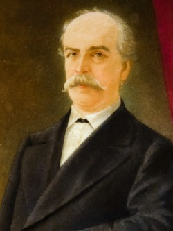 Victor Lamas como senador, en 1882